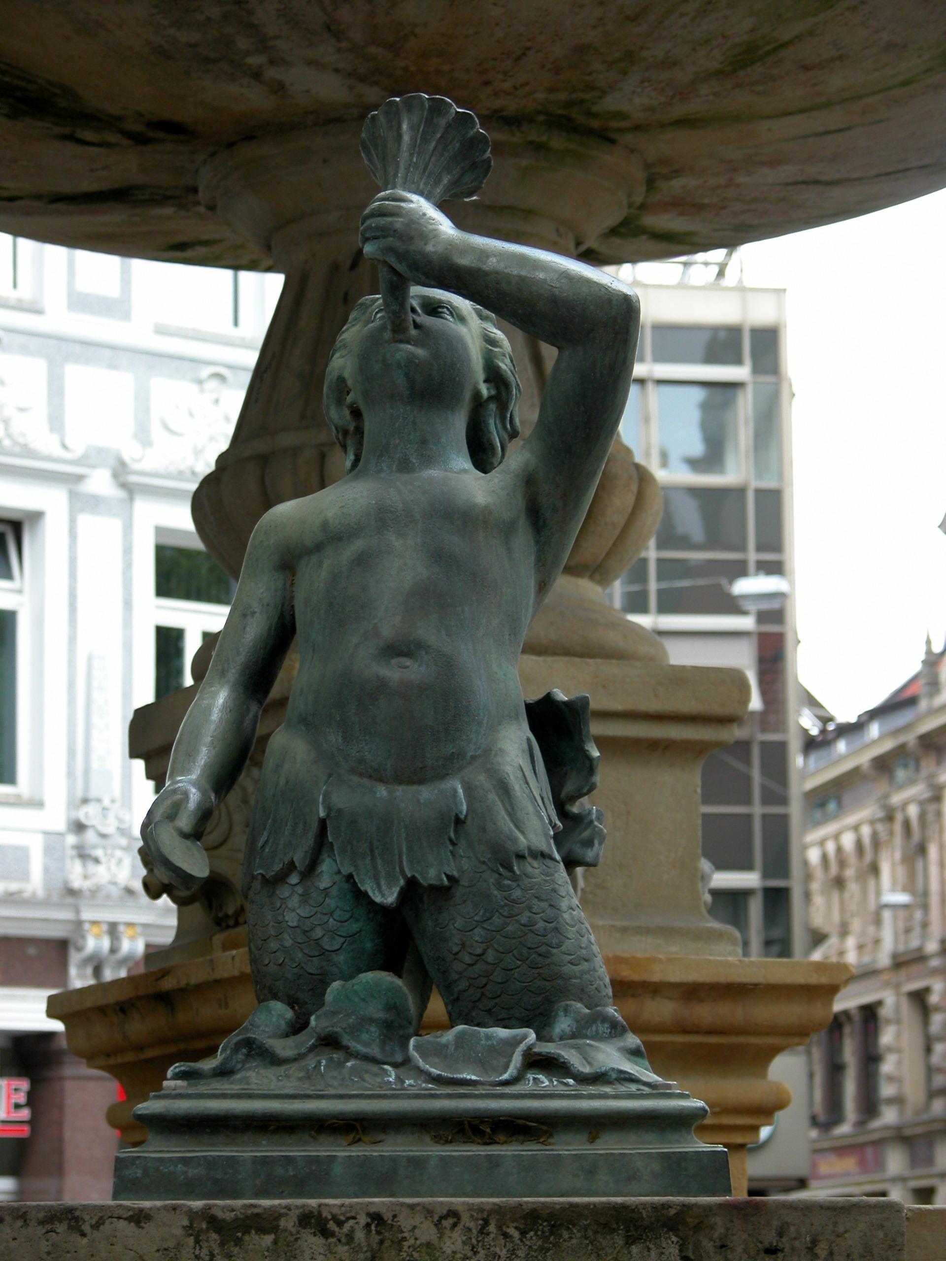 Braunschweig: Tritone vom Kohlmarktbrunnen.